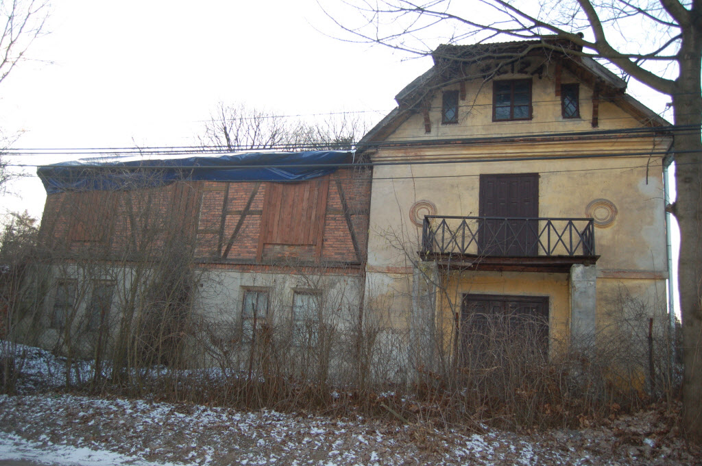 Willa Eliza miejscowość Tenczynek